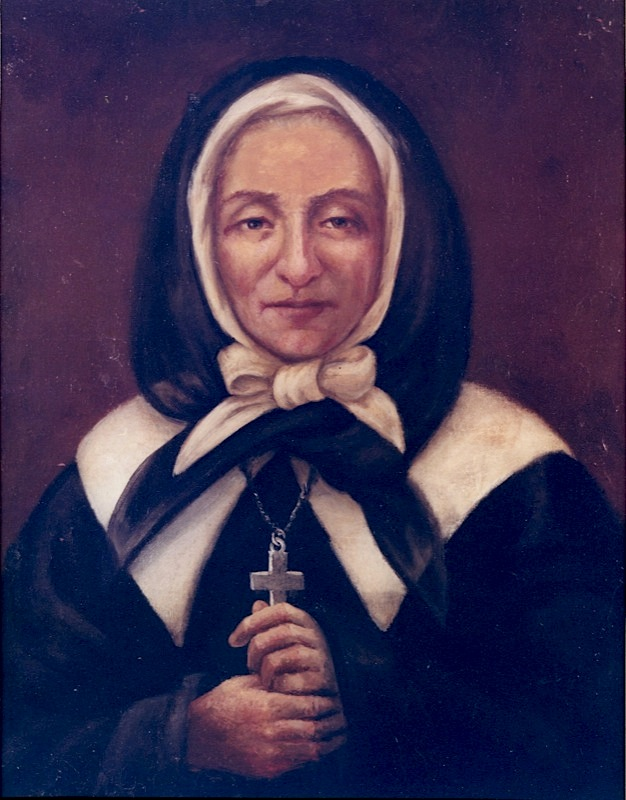 Portrait de Marguerite Bourgeoys avant la restauration en 1963, surnommé le pseudo-Le Ber